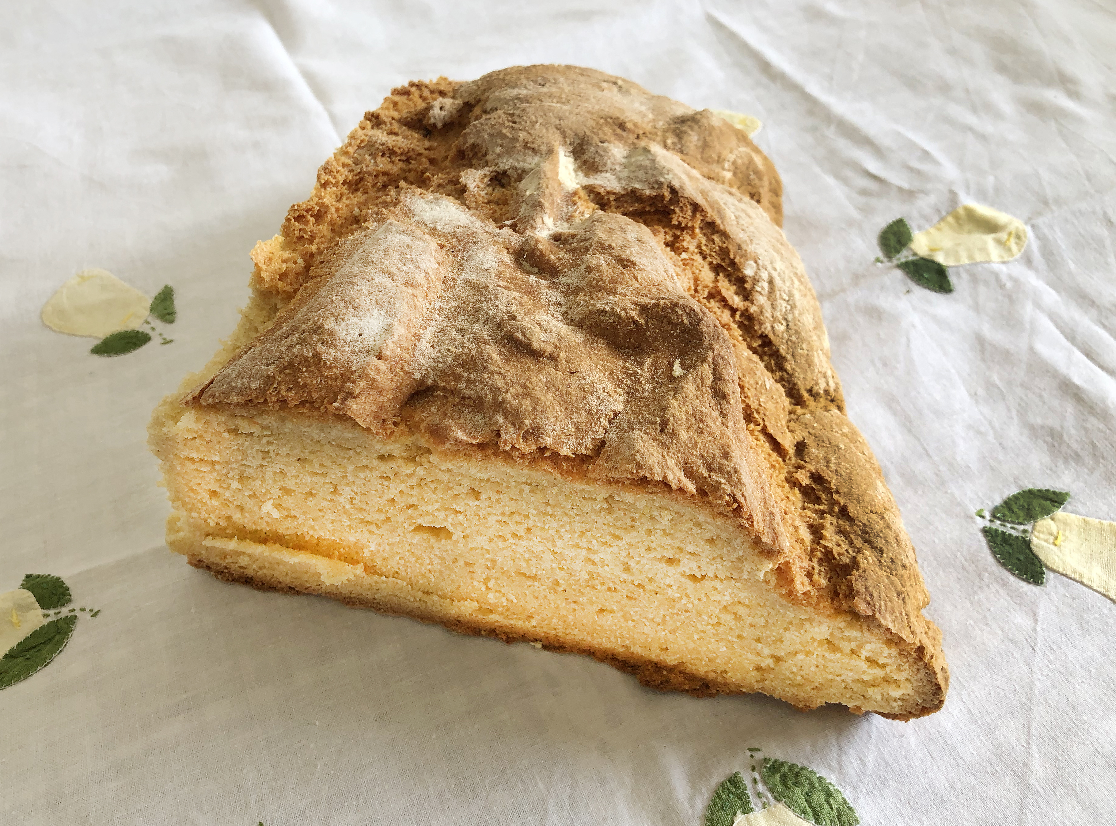 Es un pan elaborado a base de harina de maíz, también puede llevar harina de trigo, producto típico de Asturias, especialmente de su zona occidental. También lo encontramos en las comunidades vecinas bajo el nombre de broa o boroa (Galicia), burona (Cantabria) y tremes o artegi (País Vasco).